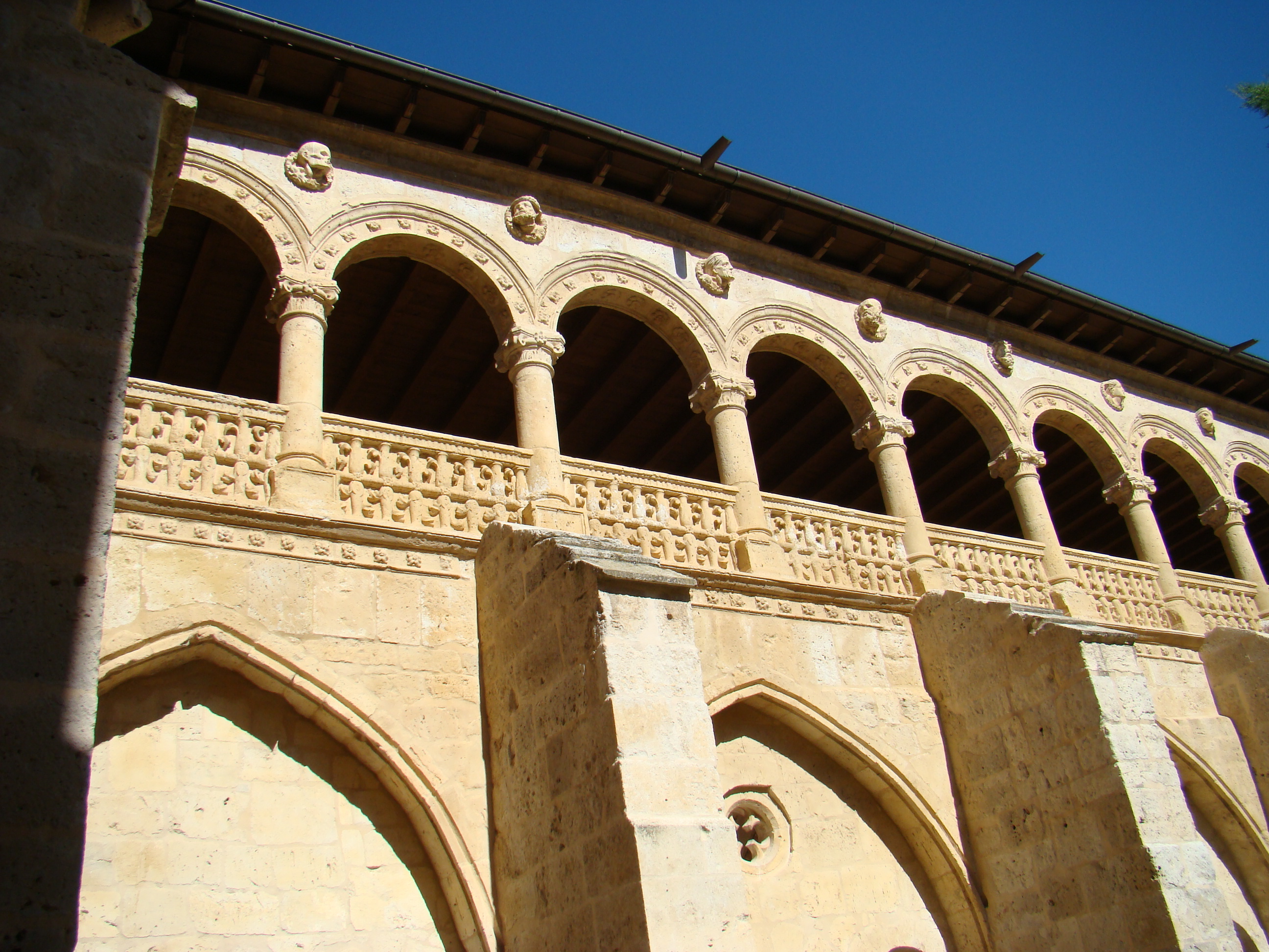 Valbuena de Duero, Valladolid, España. Claustro del monasterio de Santa María de Valbuena.